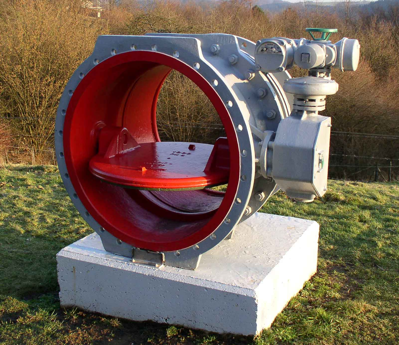 Absperrklappe